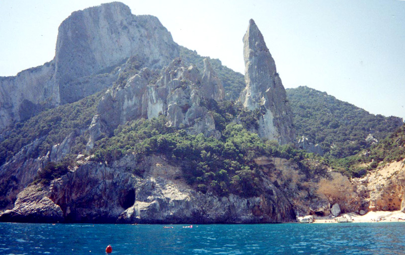 Cala Gonone-Cala Goloritzè Marrabbio2